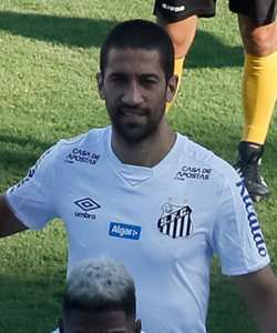 (Santos - SP, 16/11/2019) Partida de futebol Santos e São Paulo na Vila Belmiro. Foto: Isac Nóbrega/PR